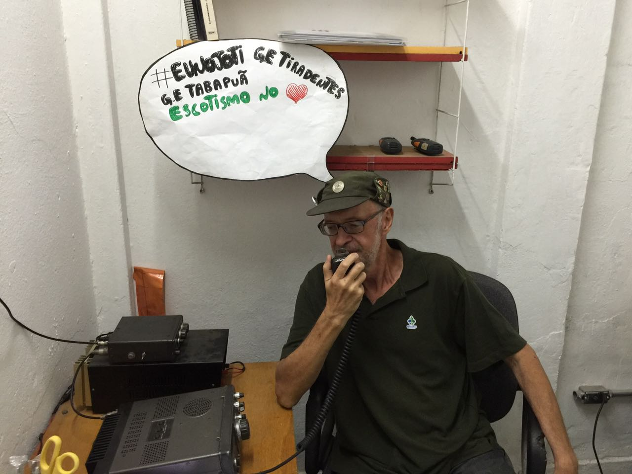 Alexandre Fejes Neto, o chefe Lecão, no Jamborée no Ar, em